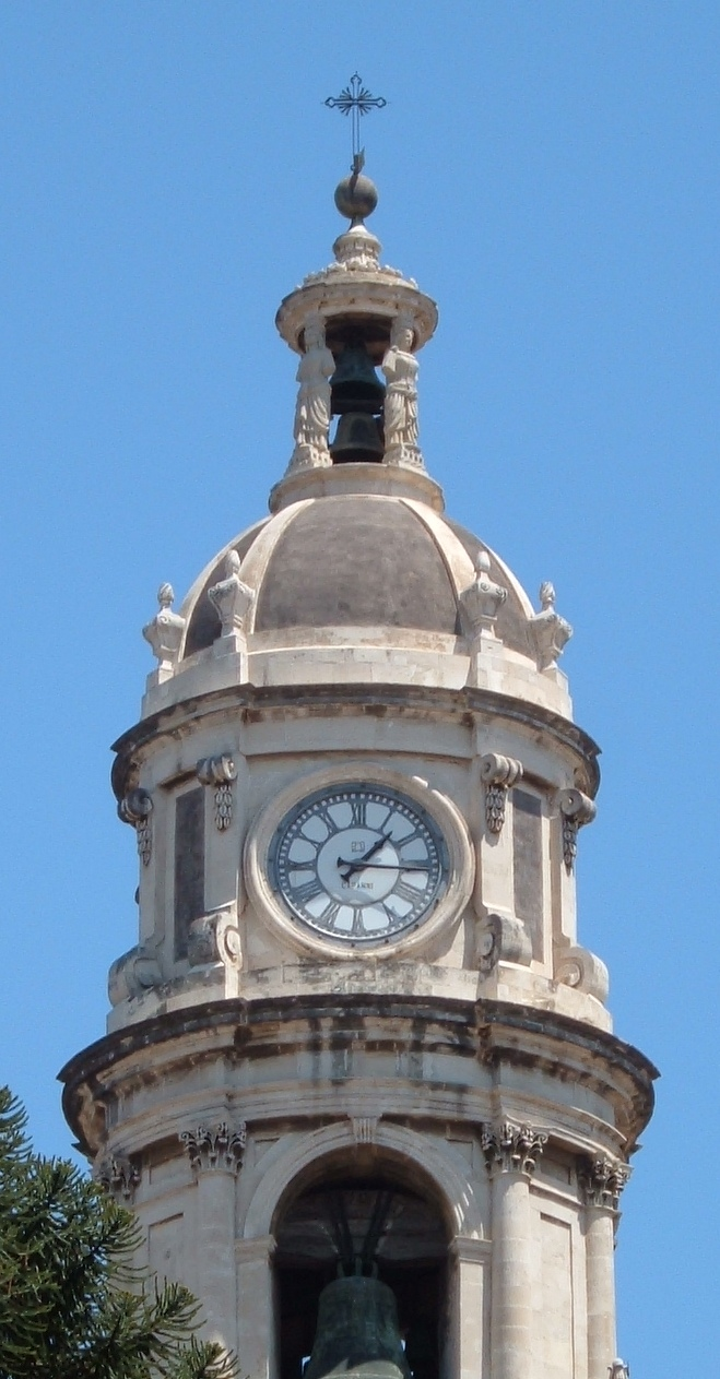 Campanile del duomo di Catania (1868), opera dell'architetto Carmelo Sciuto Patti.